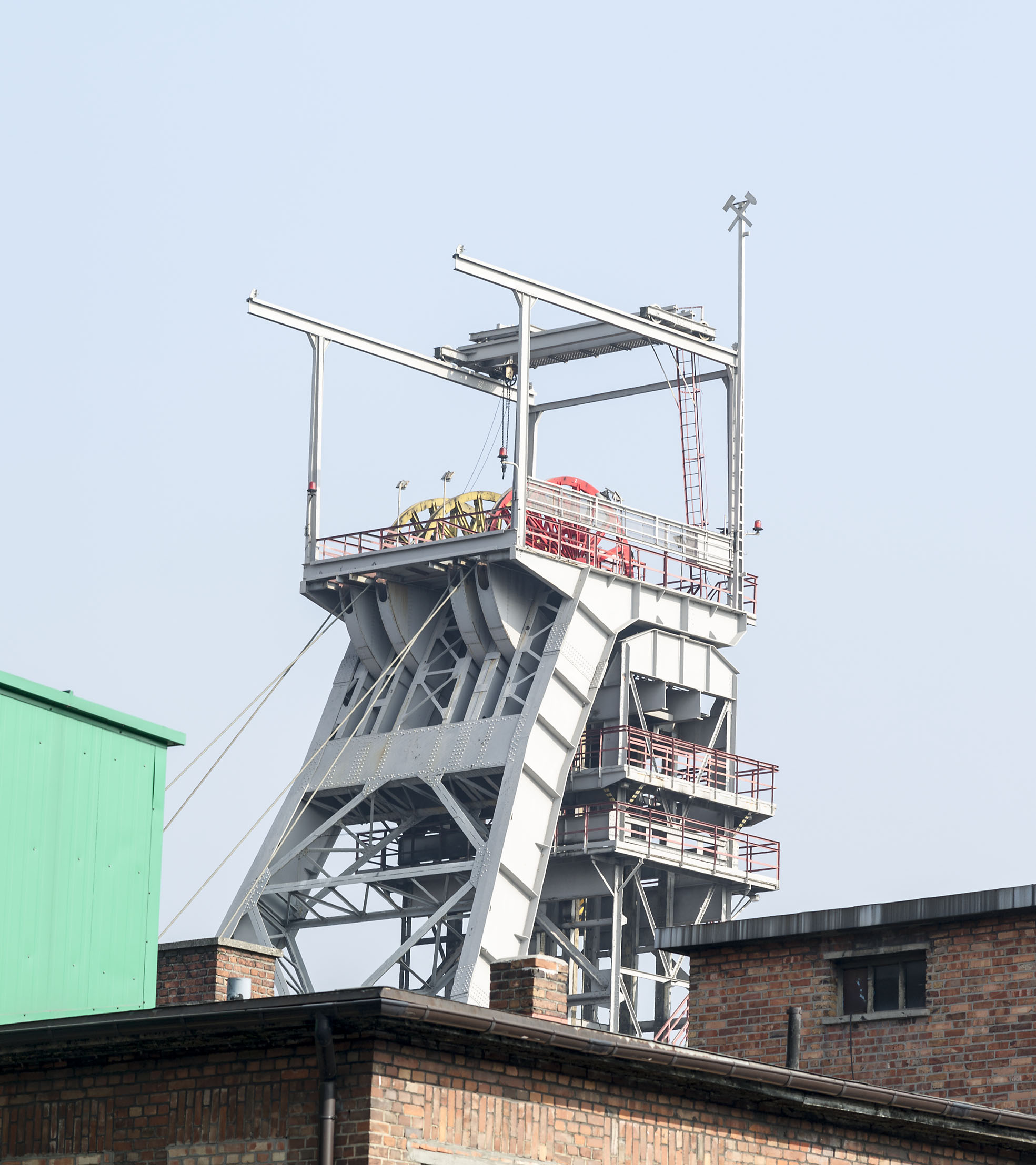 Bergwerk Chwałowice, Rybnik.